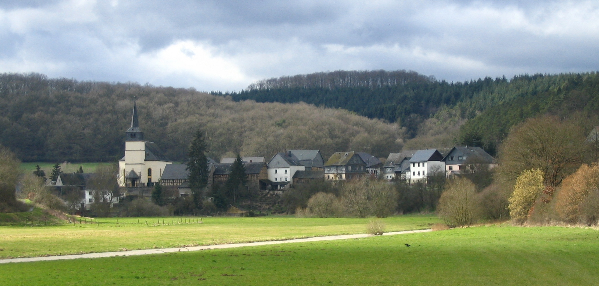 Hausen in Kyrbachtal, Hunsrück